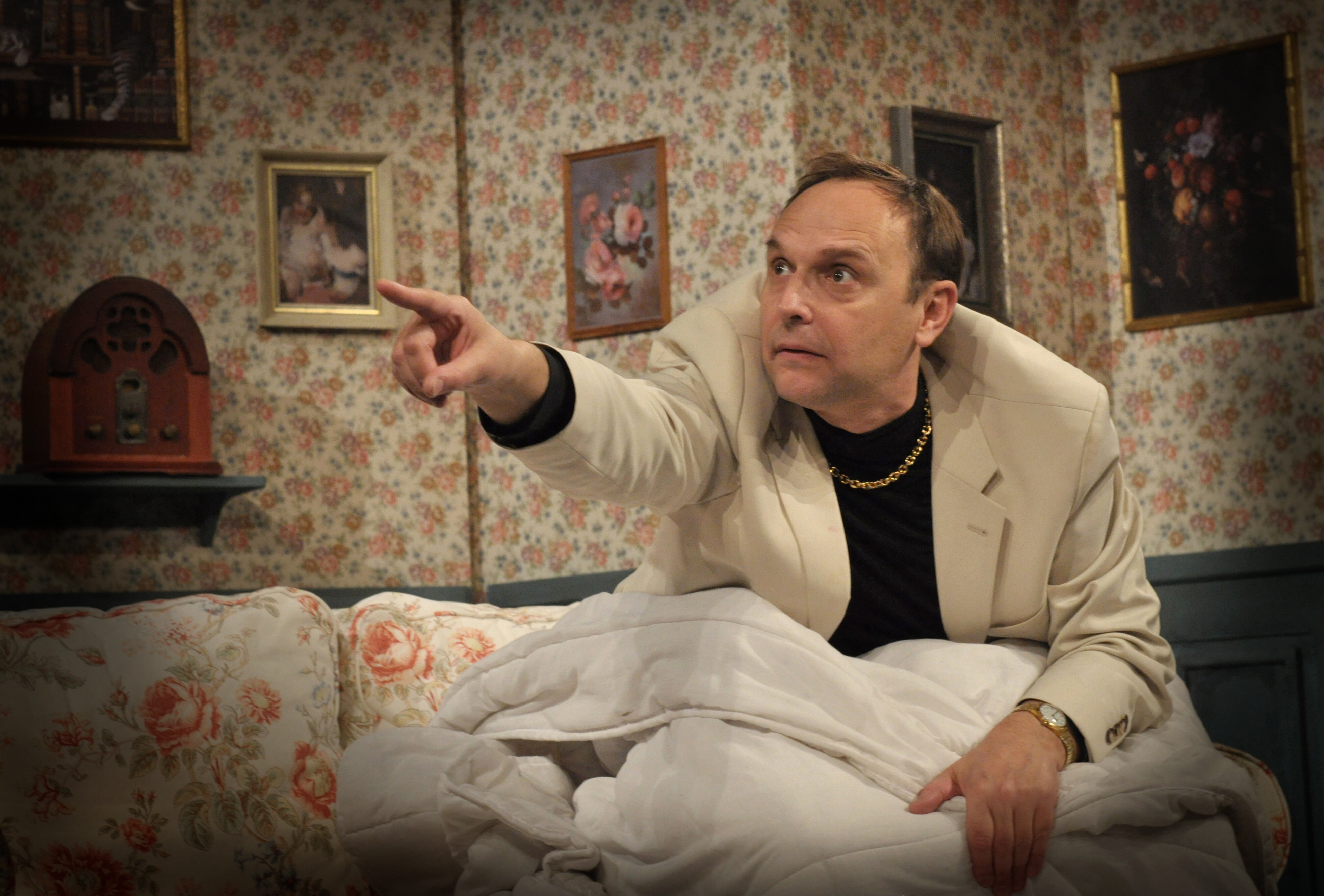 Pavel Kikinčuk během představení Prachy ! ! !